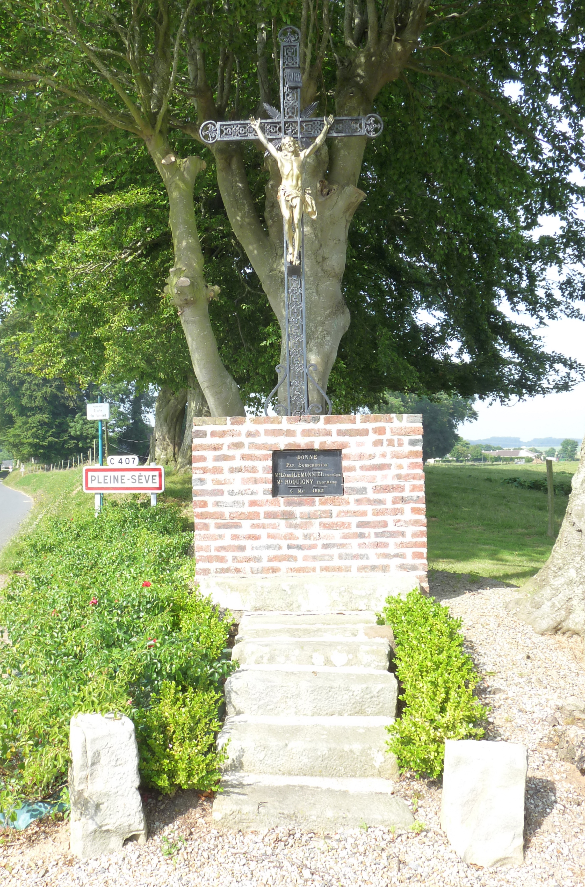 Calvaire à l'entrée du village de Pleine-Sève